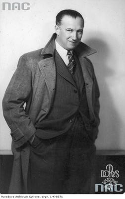 Mieczysław Krawicz (1893-1944) - polski aktor, reżyser filmowy. Fotografia portretowa w płaszczu. 1934